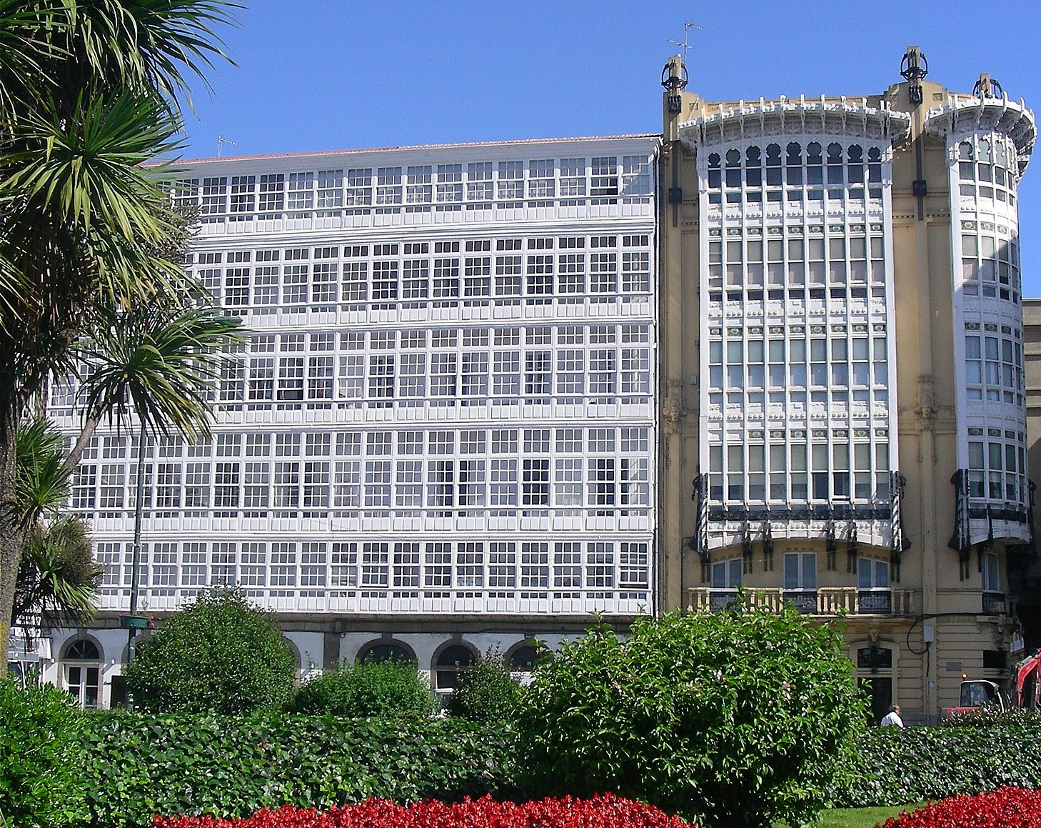 1094-Galerias (Coruña). Porta Real